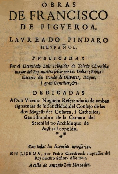 Portada del libro "Obras de Francisco de Figueroa", publicado en Lisboa por Luis Tribaldos de Toledo (1625).